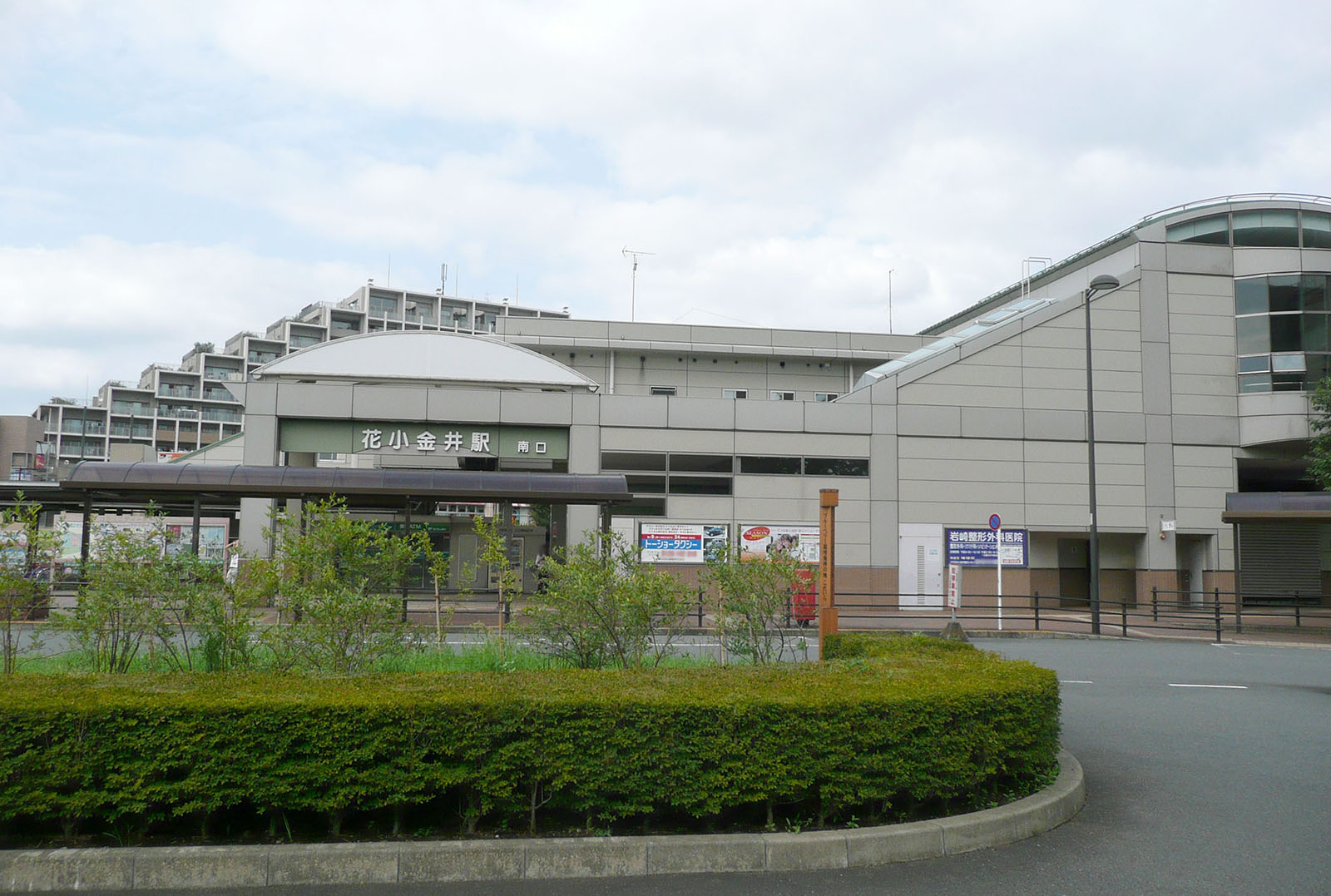 花小金井駅南口